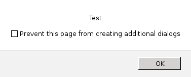 Hinweis zum blockieren von weiteren alert in Javascript. Beispiel im Firefox bei zuvielen alert nacheinander.